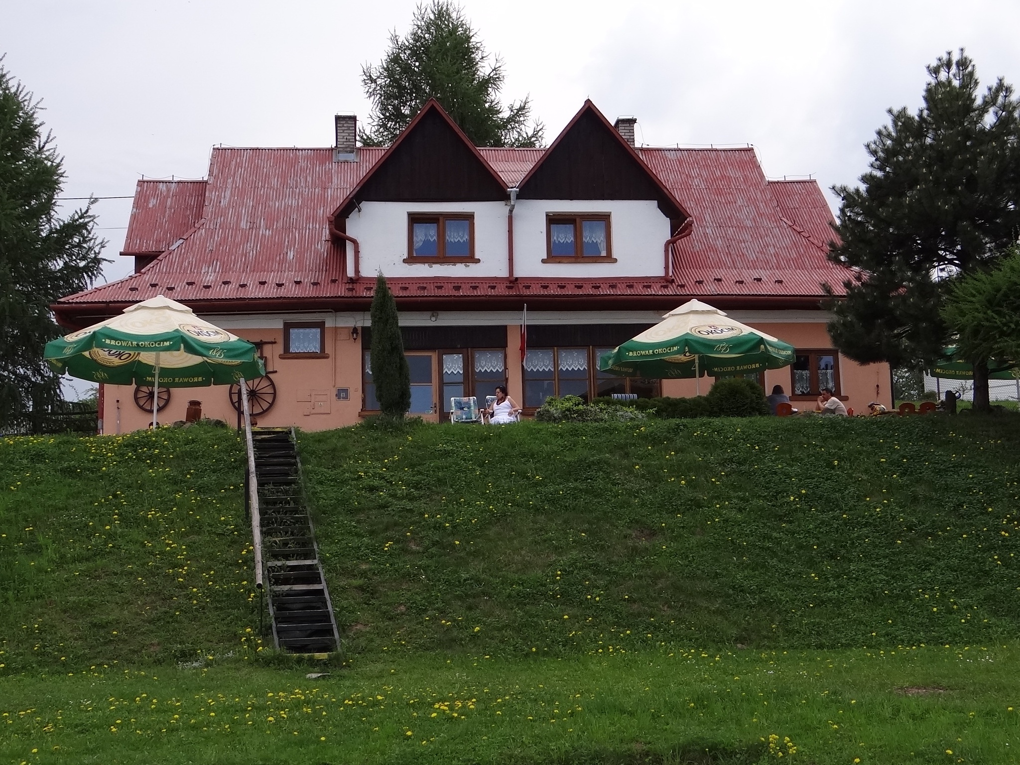 "Bacówka na Zadzielu" w Rozdzielu